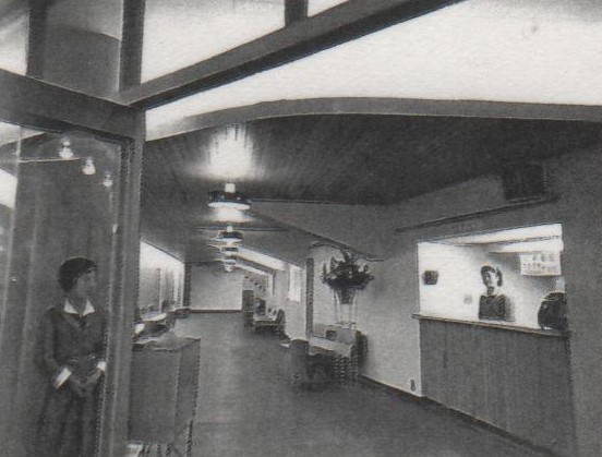 名古屋市中区の名宝会館にあった名宝スカラ座。